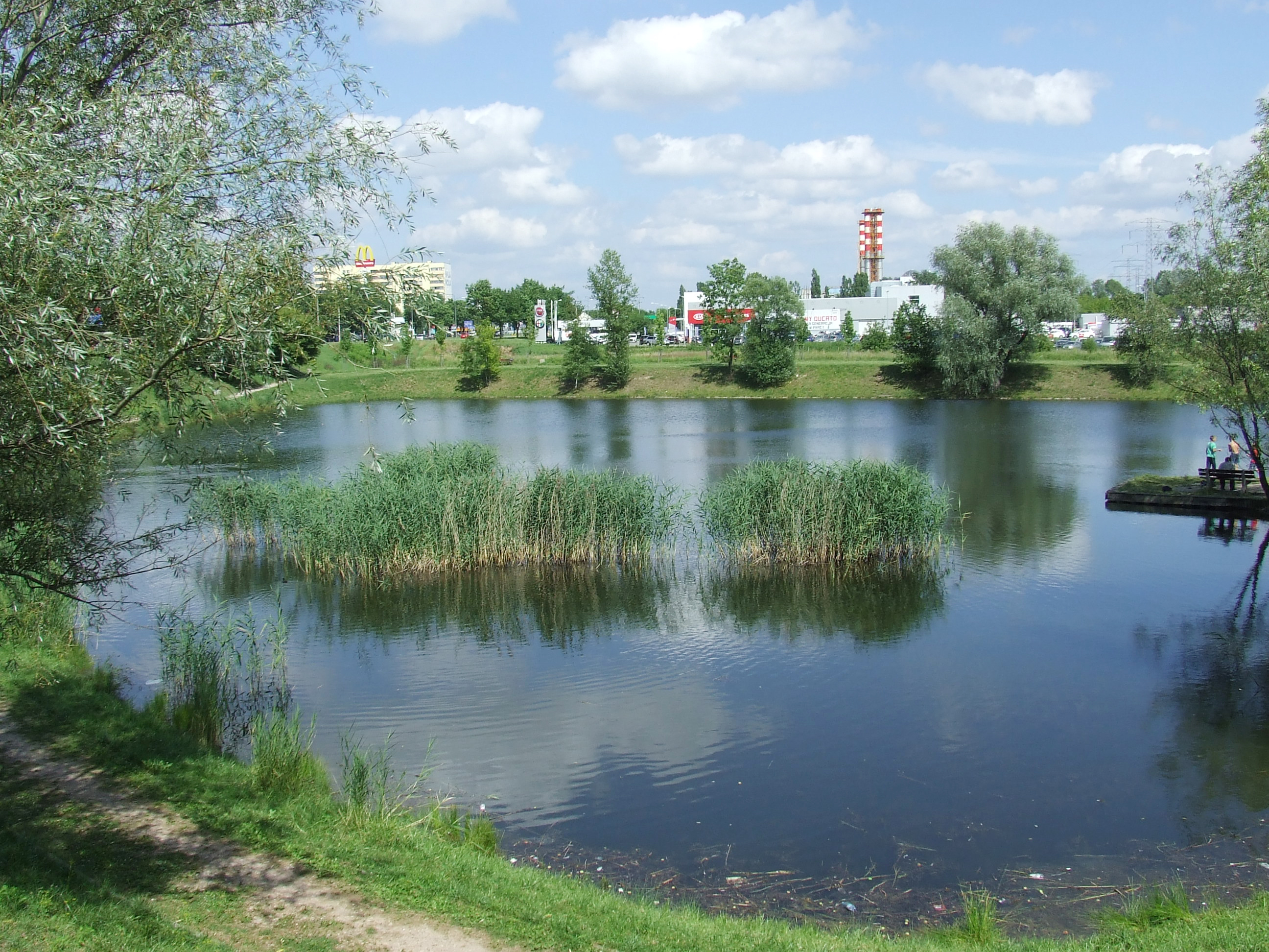 Glinianki Sznajdra, Bemowo, Warszawa